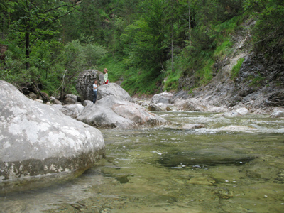 Steinbach bei Schneizlreuth